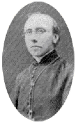 Johannes Heykamp (1824-1892), altkatholischer Erzbischof von Utrecht 1874-1892